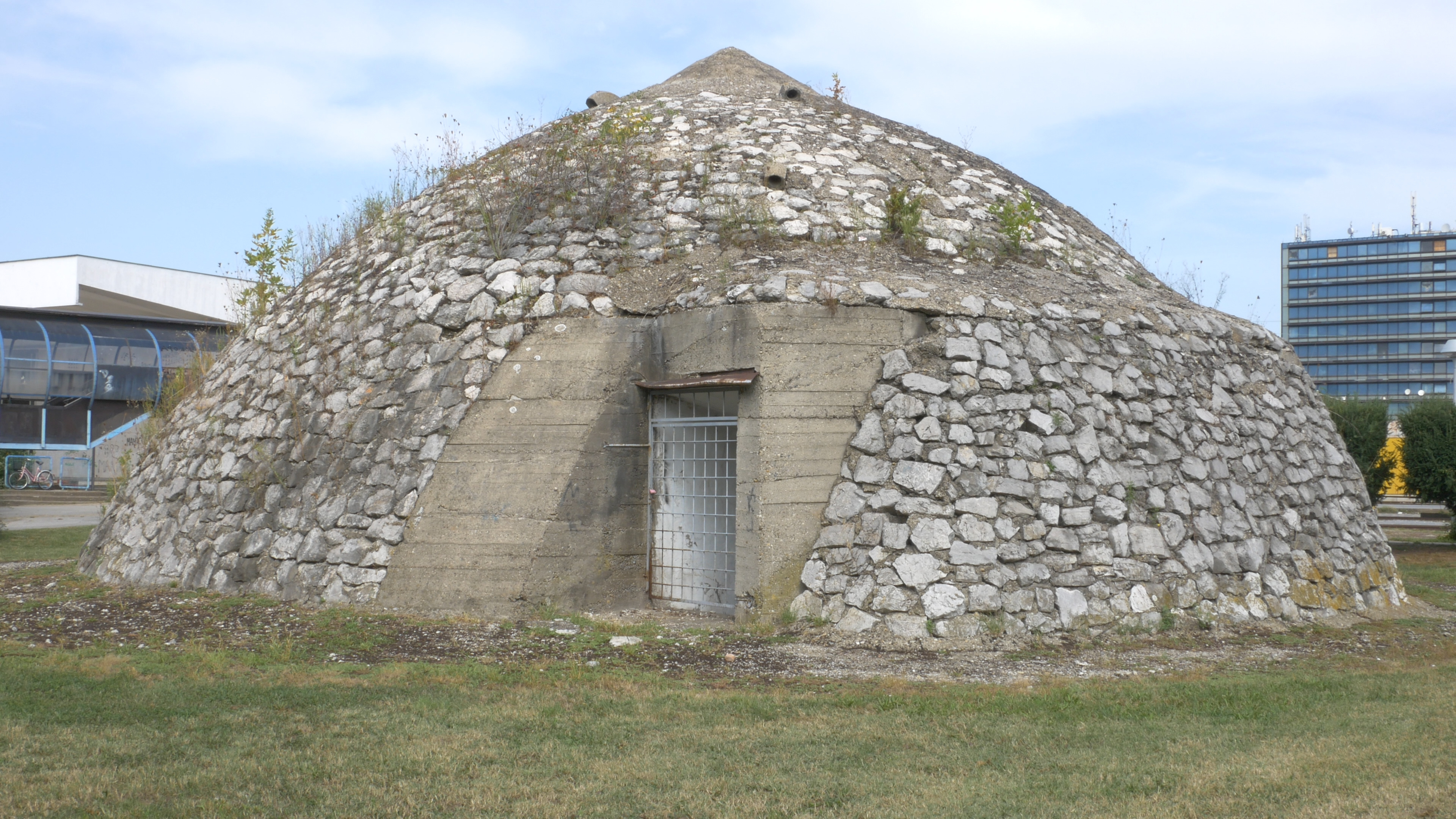 Bunker kod željezničkog kolodvora u Slavonskom Brodu